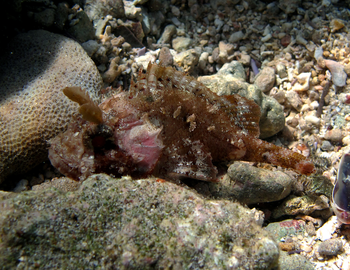 Un petit poisson-scorpion Parascorpaena mcadamsi à la Réunion.